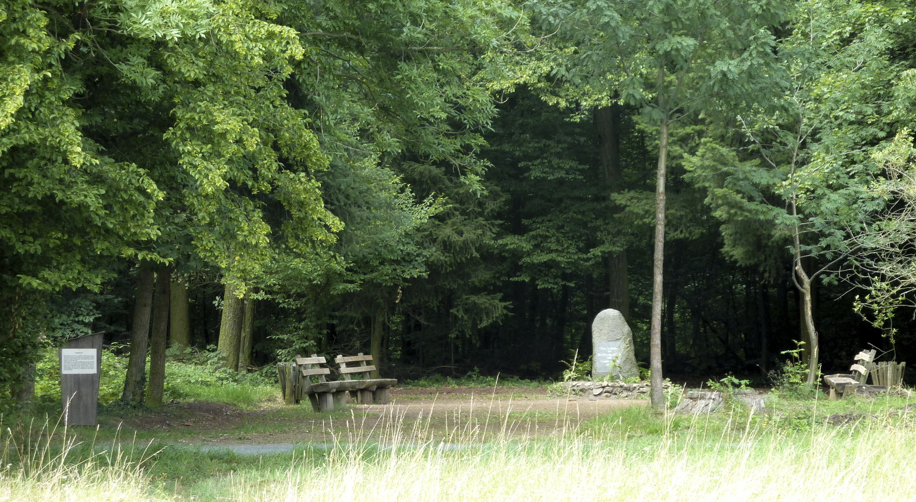 Frankfurt am Main, Hessen: Die Kobeltruhe (auch Kobelt-Ruhe) ist ein Rastplatz und Ausflugsziel im Frankfurter Stadtwald. Der 1921 eingerichtete Platz ist der Erinnerung an Amalie Kobelt und ihren Ehemann, den Frankfurter Arzt Prof. Dr. Wilhelm Kobelt (1840–1916) gewidmet, der im Jahr 1908 an dieser Stelle eine der ersten Wald-Erholungsstätten Deutschlands hatte einrichten lassen